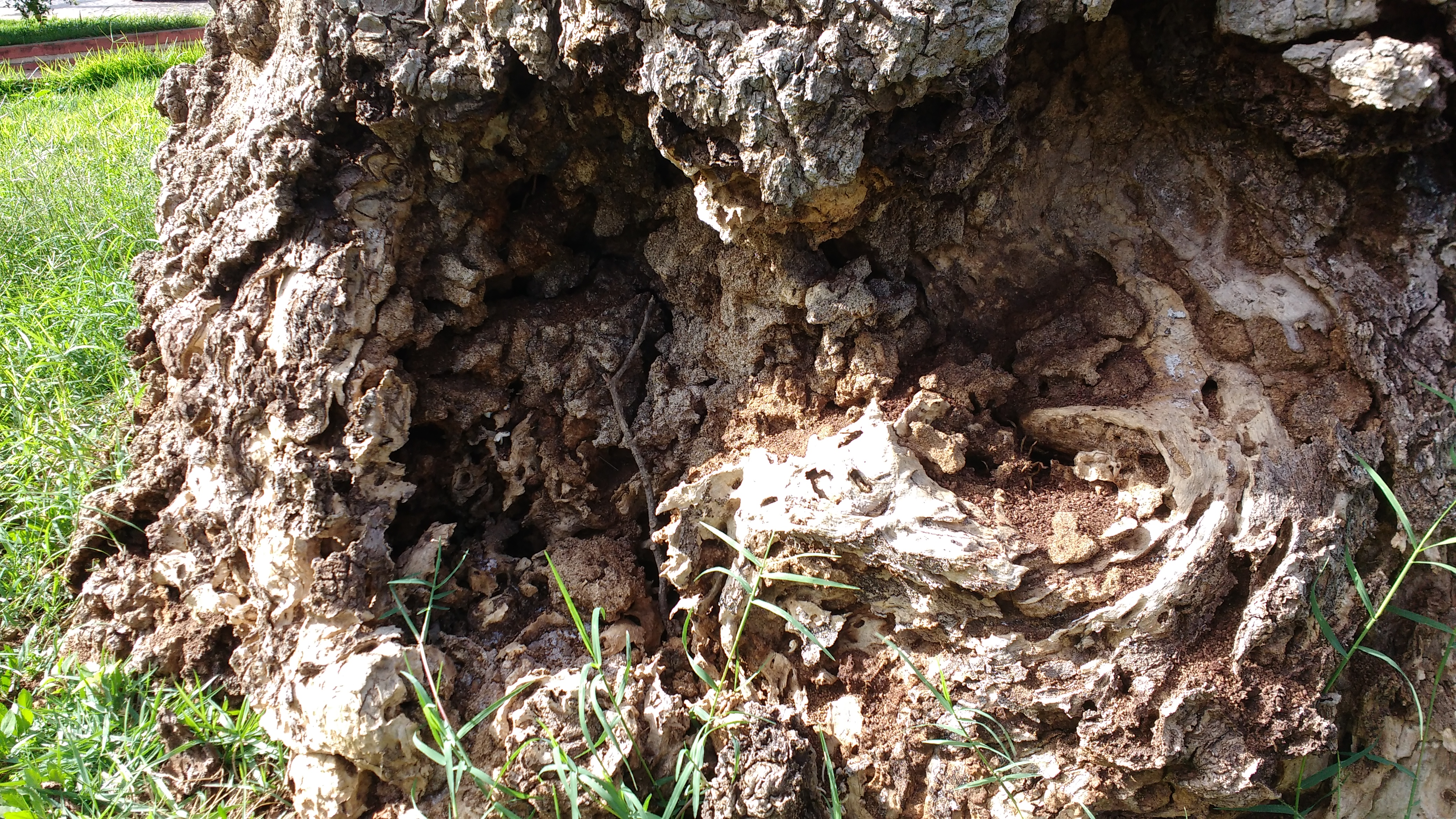 Tronco de paineira (barriguda) - gênero Ceiba (antes, Chorisia) da família Malvaceae (antes, Bombacaceae) - mostrando os sinais característicos do ataque pela larva de Euchroma gigantea.